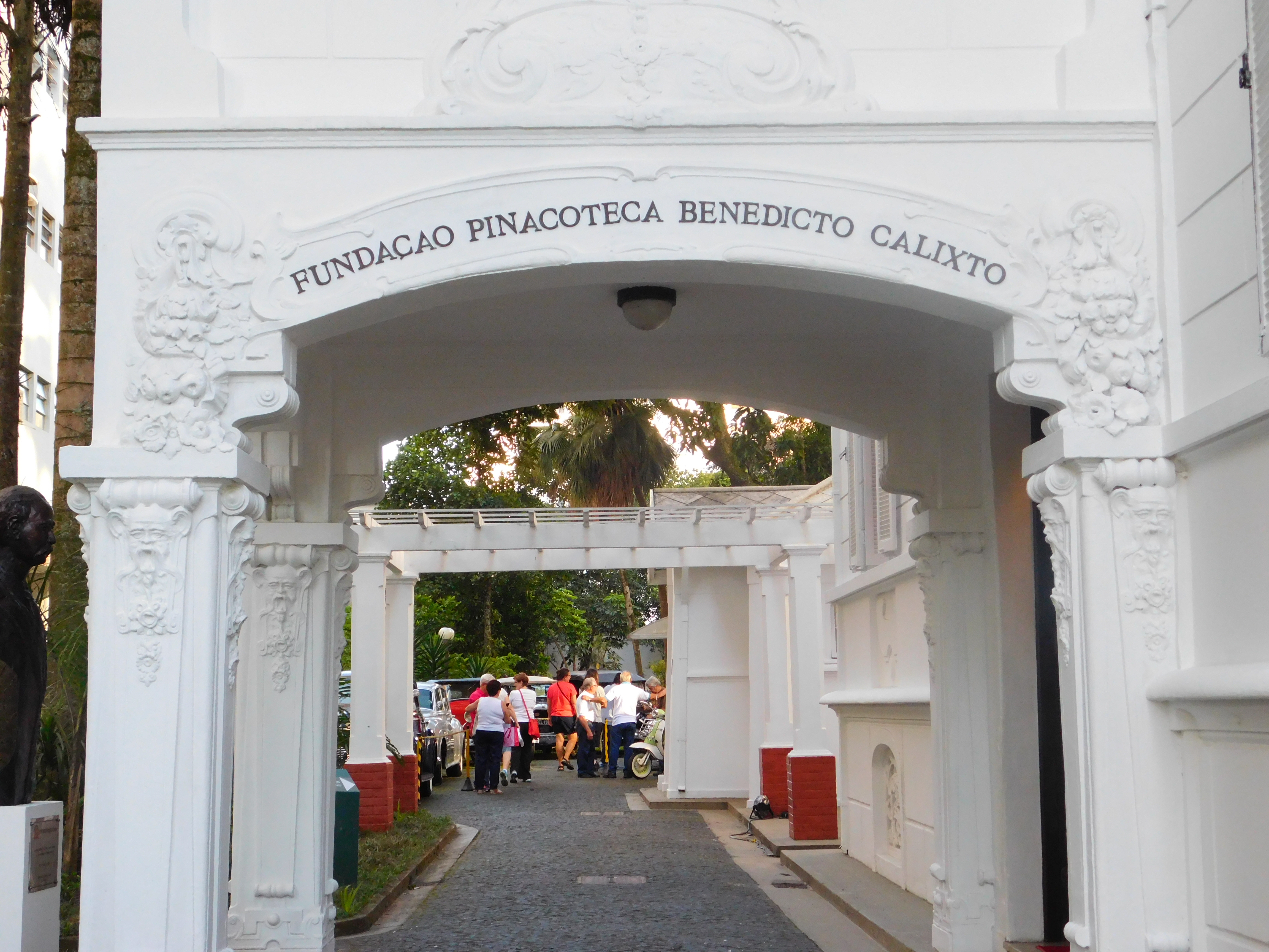 A Fundação Pinacoteca Benedicto Calixto tem o objetivo de difundir e estimular a produção artística em geral, especialmente às artes plásticas no município brasileiro de Santos. É denominada Benedicto Calixto em homenagem ao pintor que tanto se dedicou a retratar e estudar Santos e região. Nesta imagem, o prédio da fundação durante uma exposição de carros antigos promovida pelo "Clube de Automóveis Antigos de Santos".